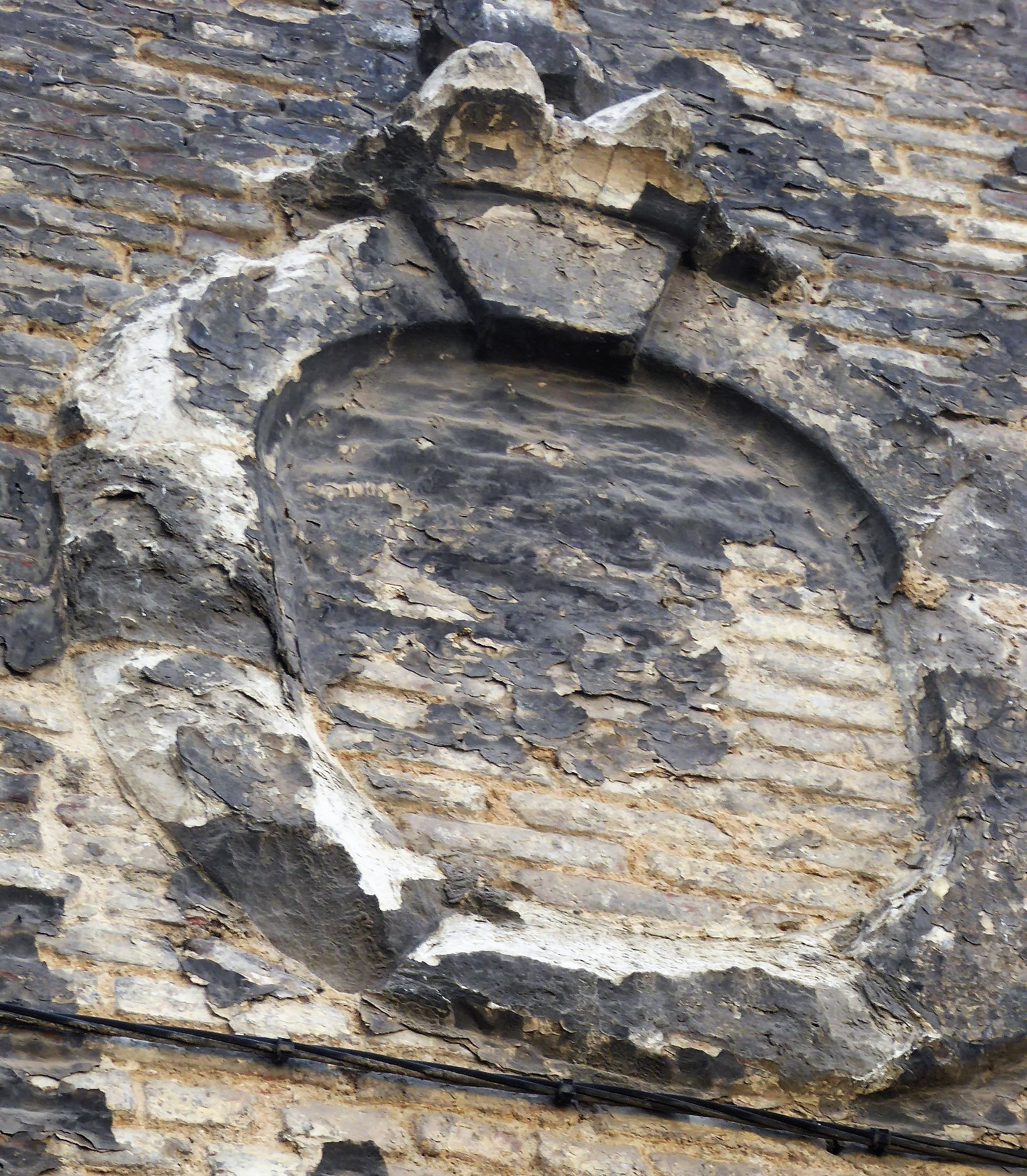 Rue de la Riviérette vestiges oeil de boeuf